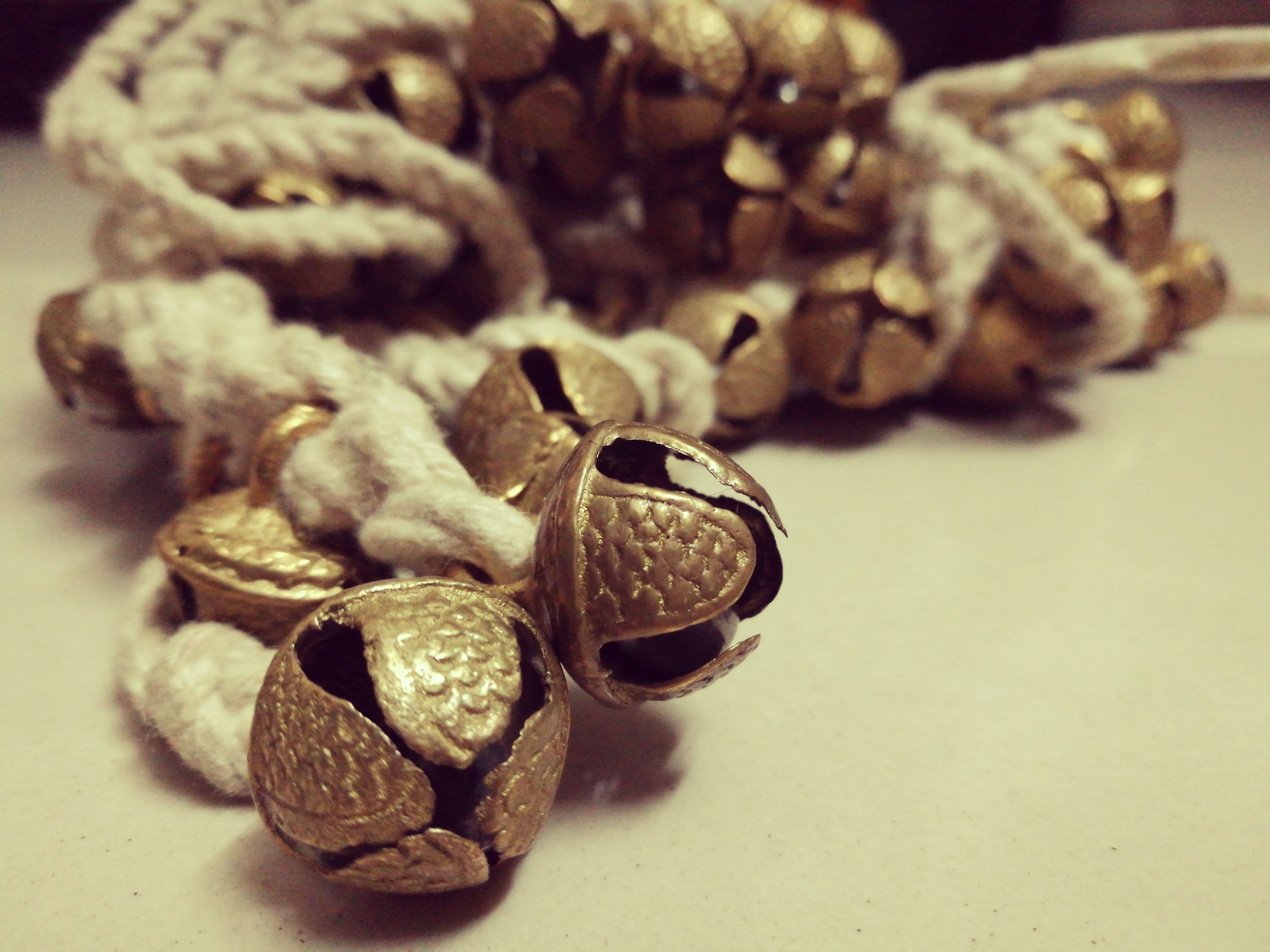 Ghungru